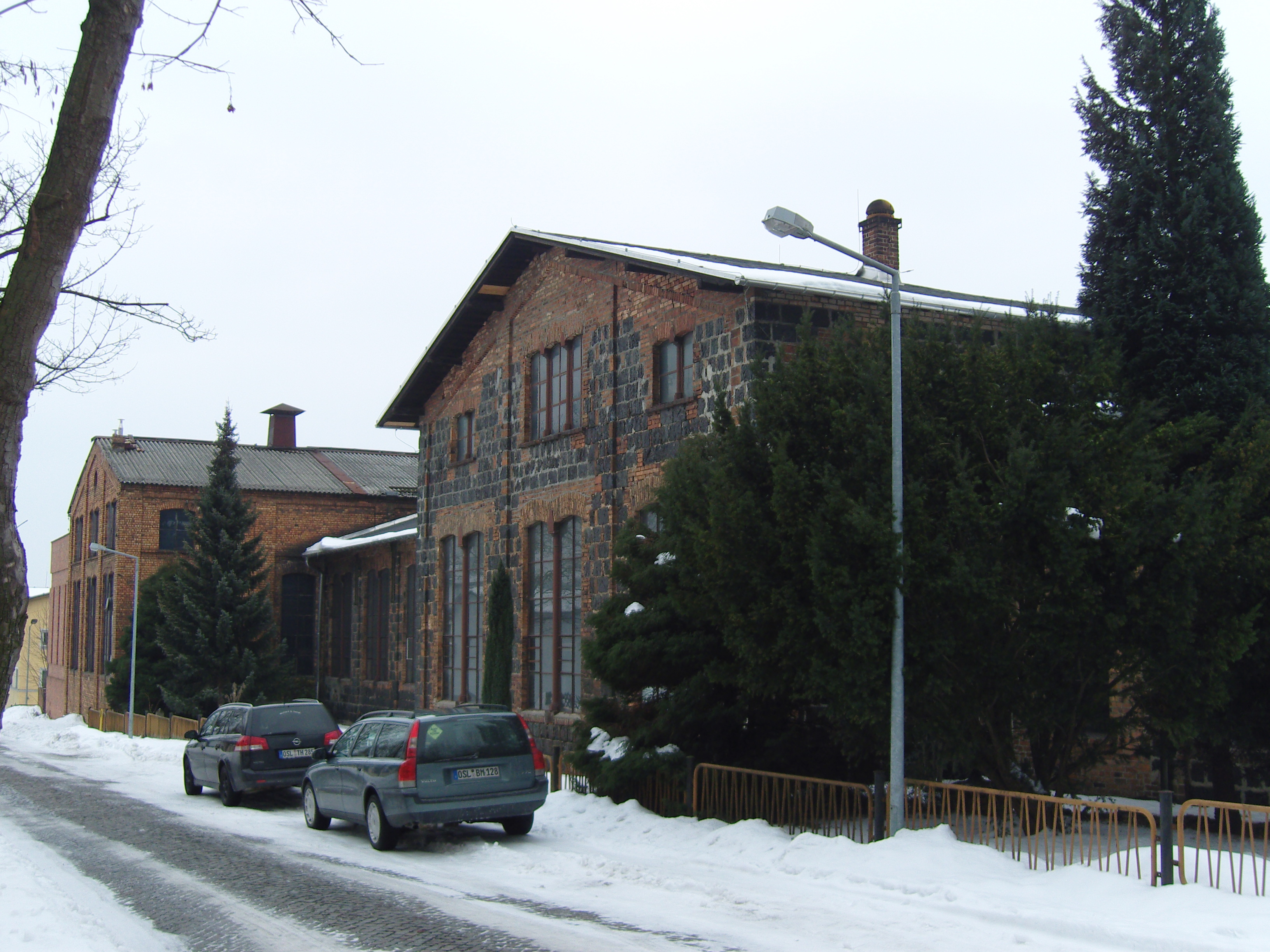 Bronzegießerei in Lauchhammer, Baudenkmal